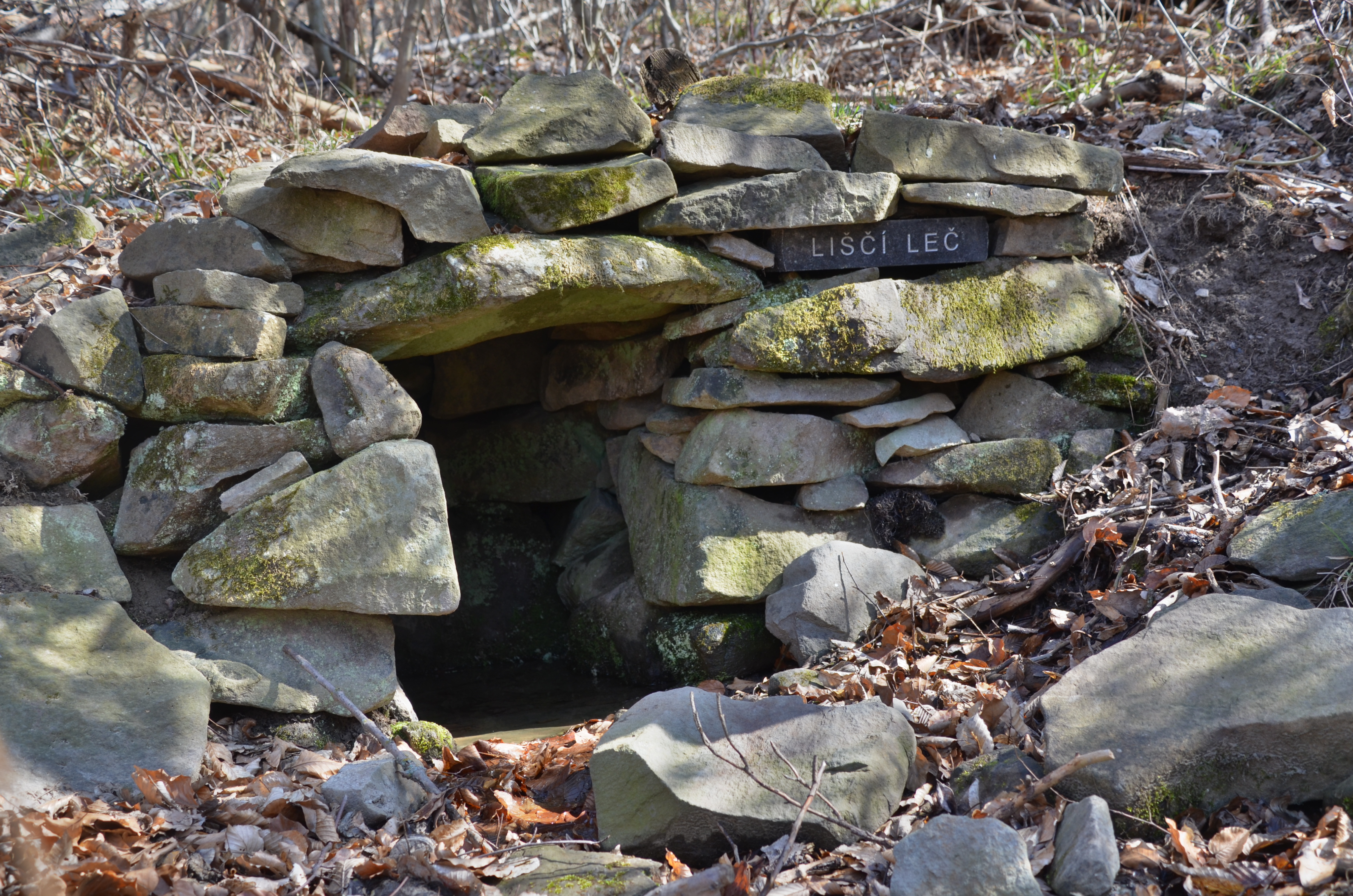 Studánka s pramenem pod stejnojmenným vrchem v katastrálním území Křtiny u Brna